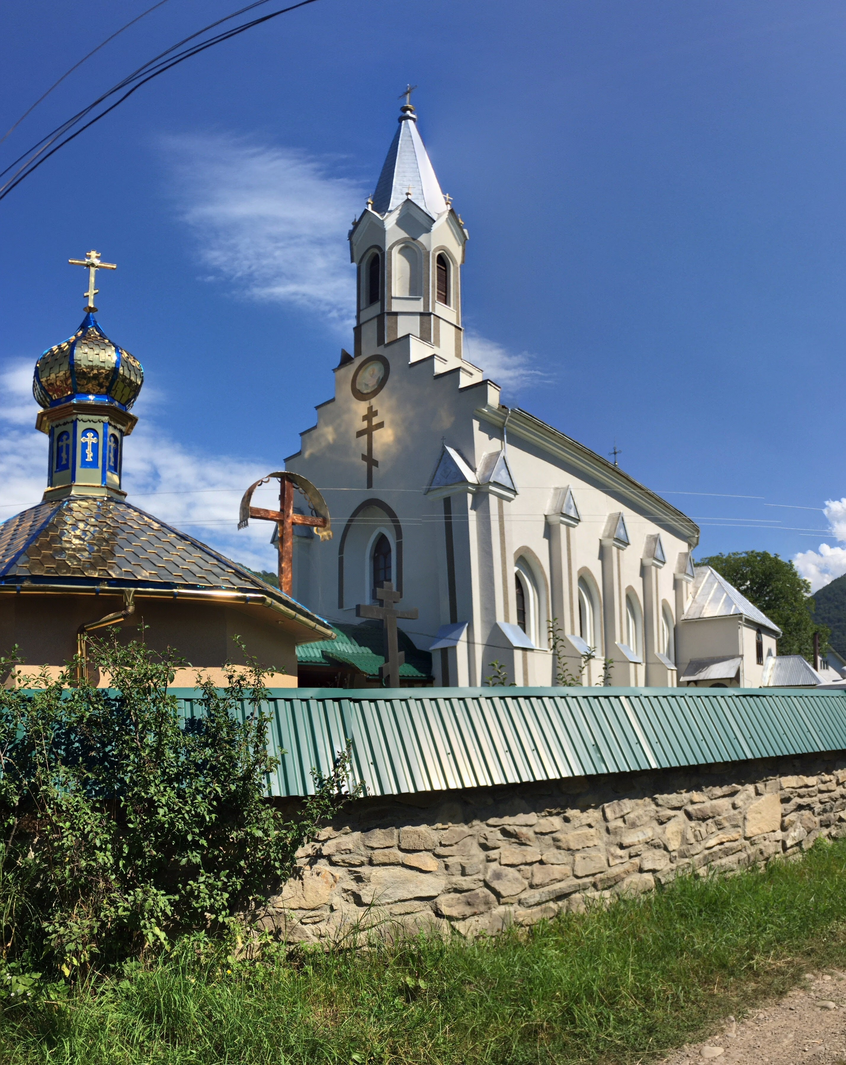 Церква Успіння Божої Матері в с.Красна (3), вид збоку